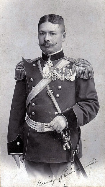 Портретна снимка на майор Калин Георгиев Найденов, професор и стратег по артилерийски науки, военен министър на България от 1915 до 1918 г. 15 октомври 1901 г.